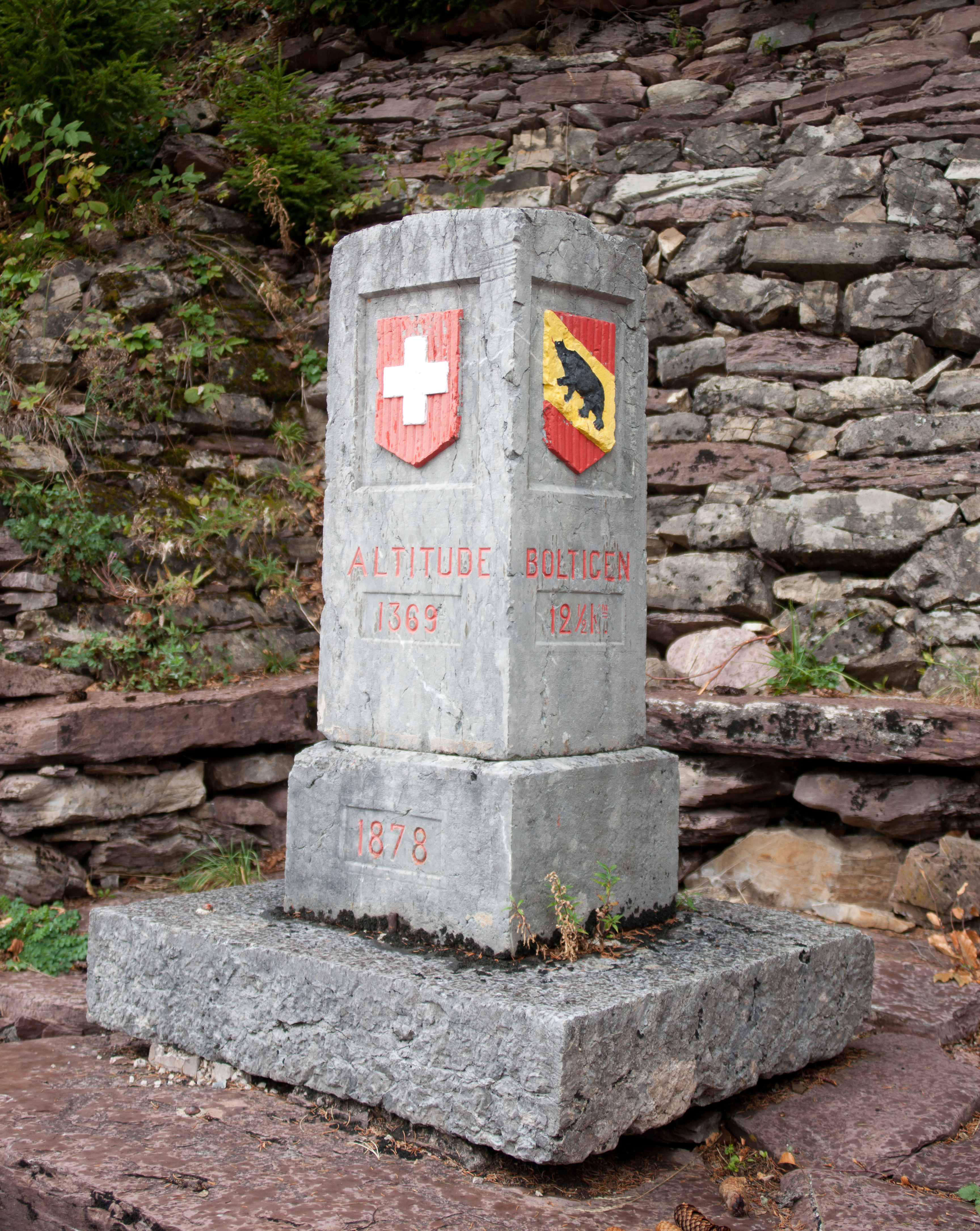 Borne frontière et routière sur le Jaunpass.